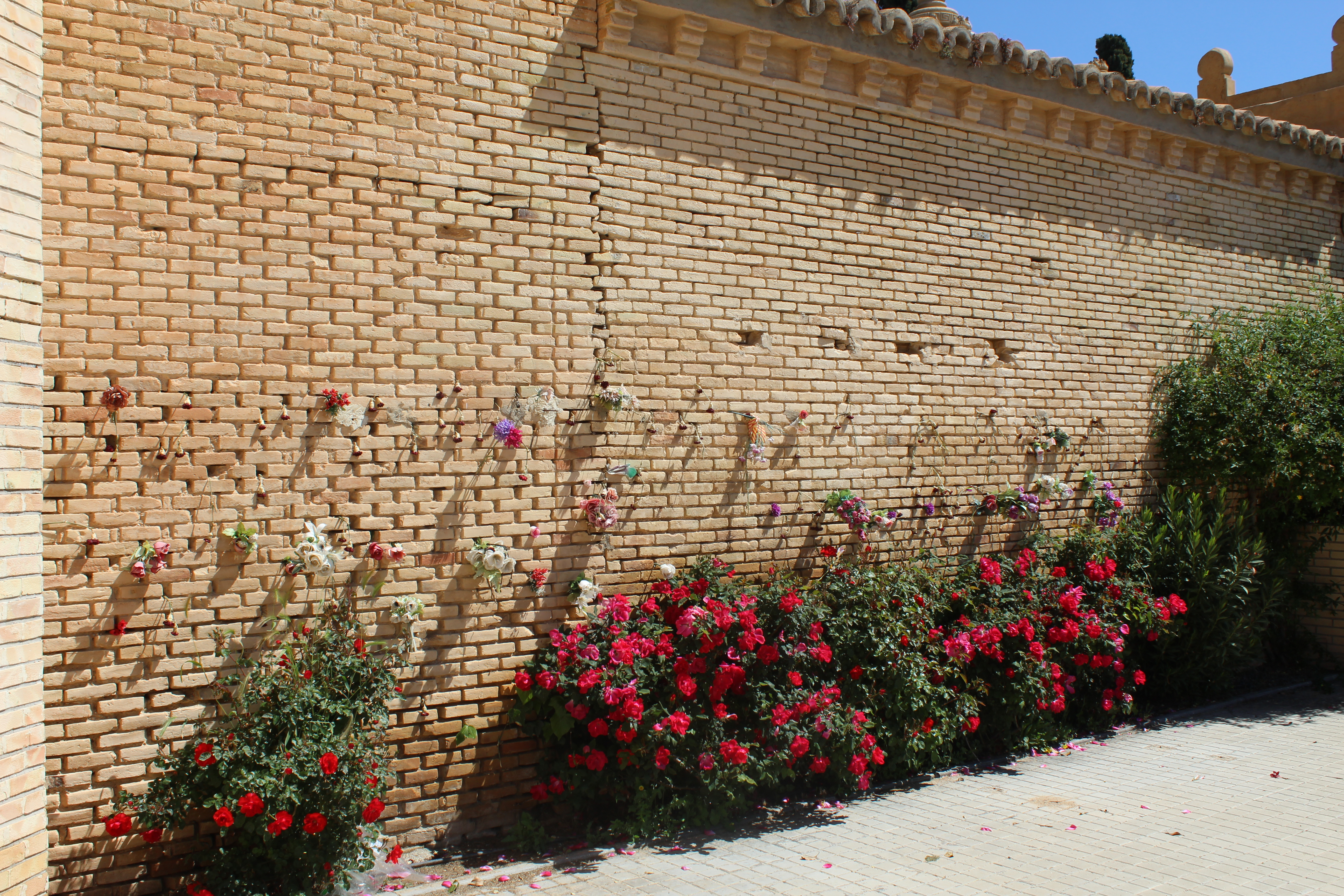 Tapia trasera del cementerio de Torrero de Zaragoza en la que fueron fusiladas centenares de personas durante la Guerra Civil y la posguerra.